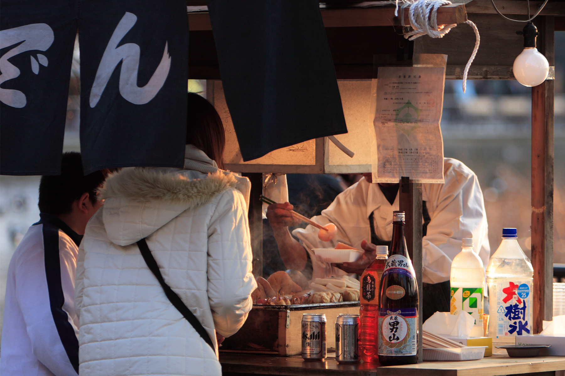 おでんの屋台（東京・台東区上野2-14付近の不忍池のほとり）Oden